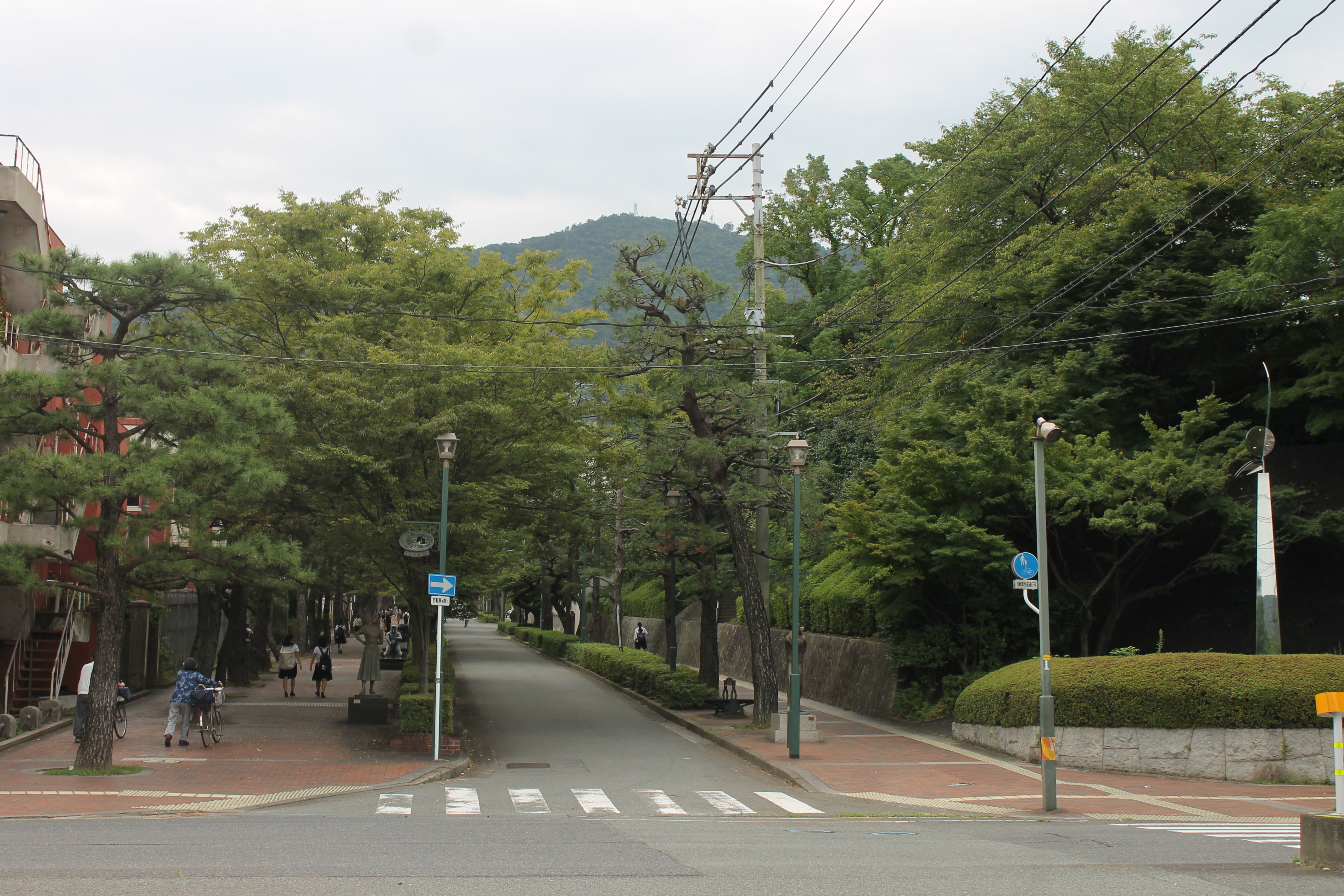 広島県呉市の美術館通りを海上自衛隊呉基地側から撮影したもの